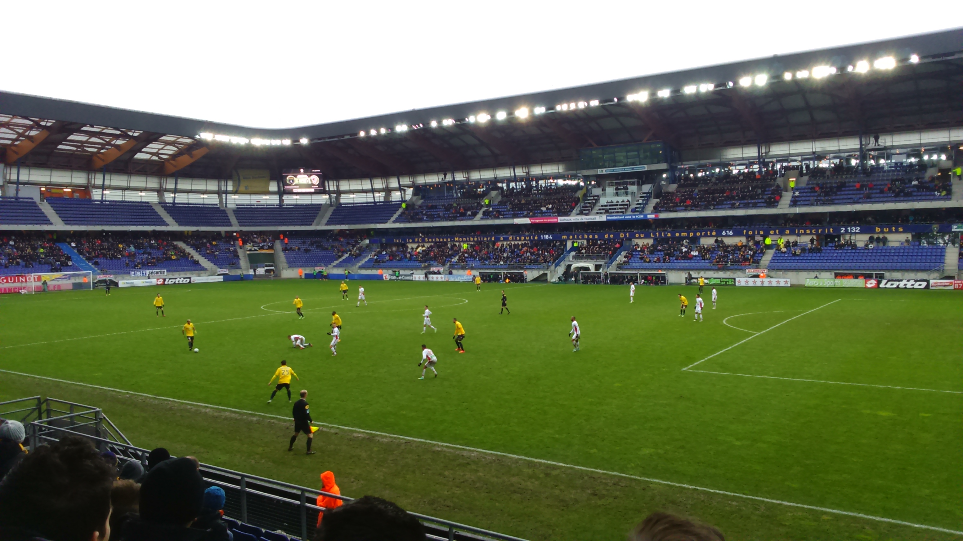 Match de ligue 2 française entre le FC Sochaux Montbéliard et AC Ajaccio le 17 janvier 2015